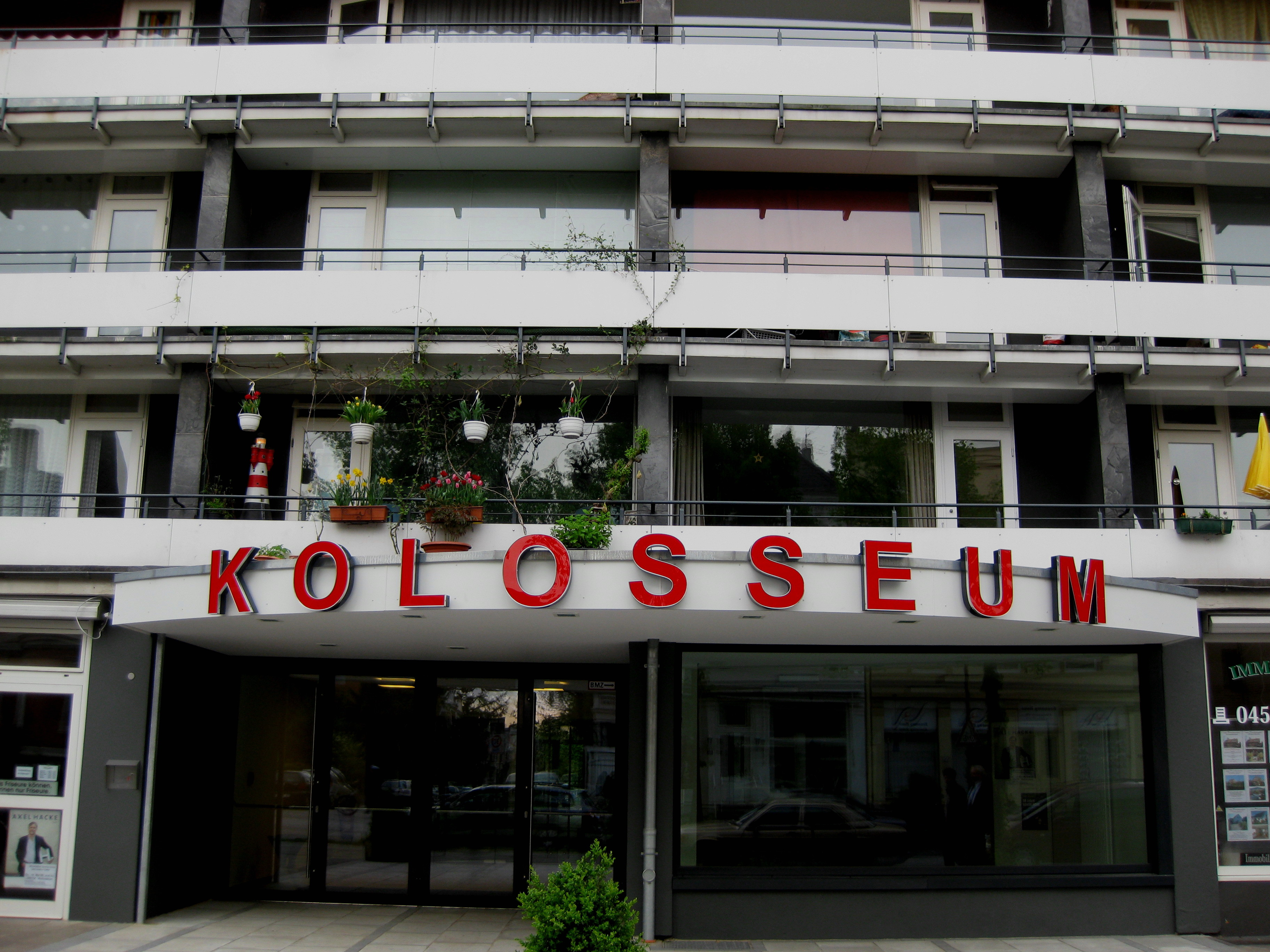 Kolosseum nach Abschluss der Sanierung 2009